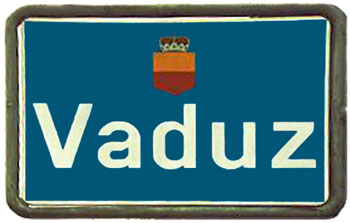 Ortsschild von Vaduz, 4.27 "Ortsbeginn auf Hauptstraasen" nach Liechtensteiner Signalisationsverordnung (SSV)